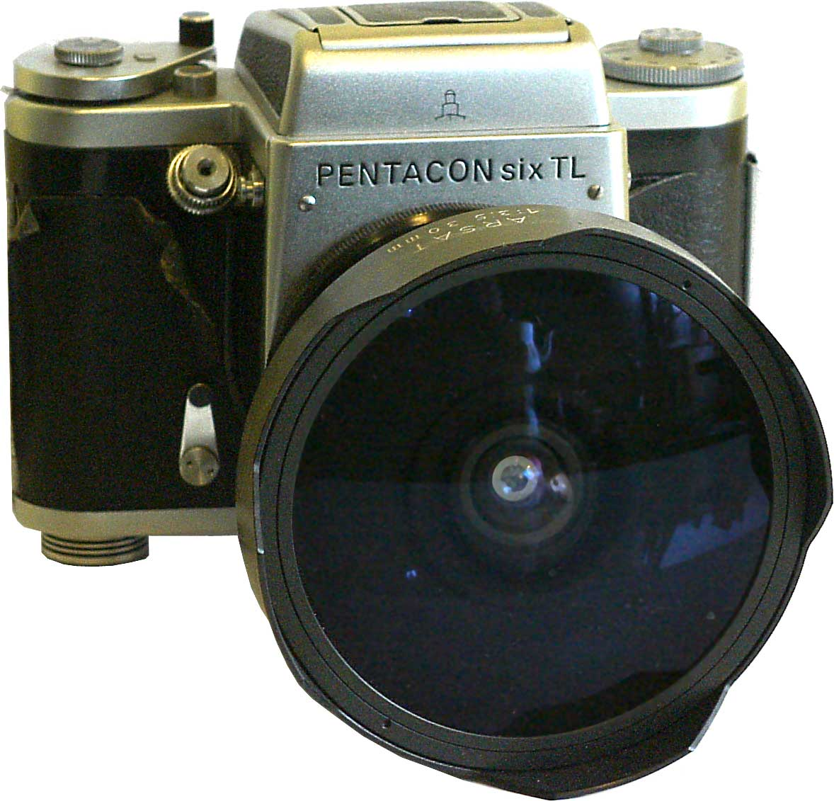 Pentacon six TL